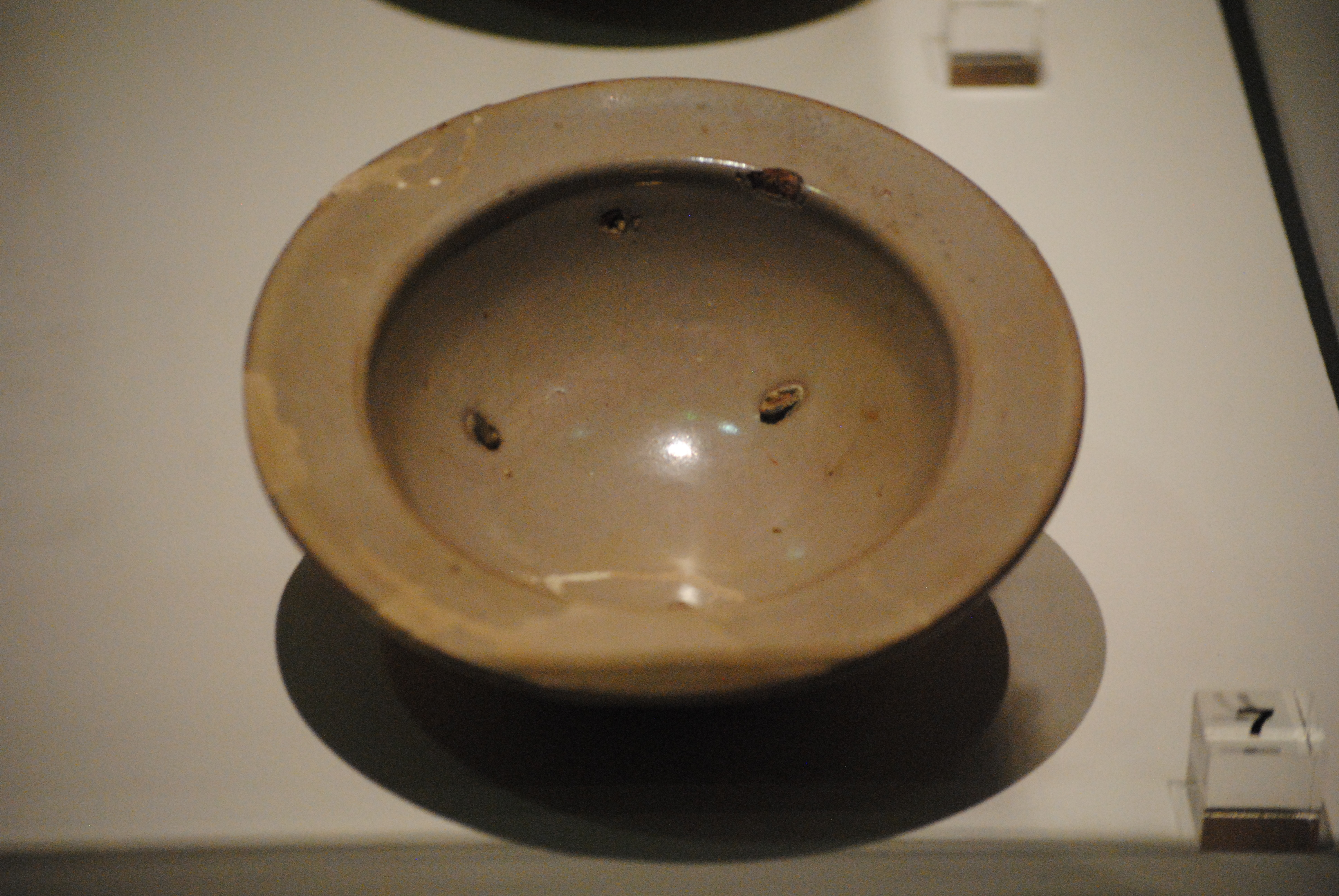 Scodella in maiolica arcaica di produzione pisana della fine del XIII - inizi del XIV secolo usata come bacino ceramico (chiesa di San Martino, Pisa) - Museo nazionale di San Matteo